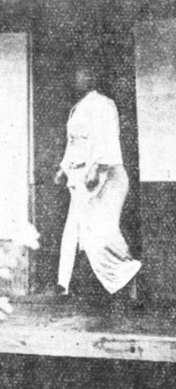 平松小笛の遺体